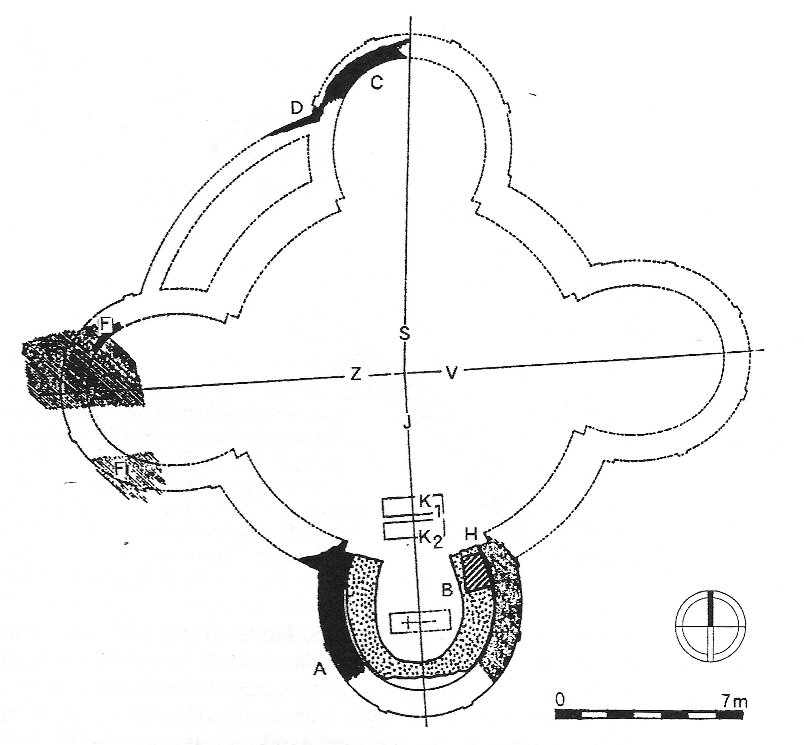 Rotunda sv. Víta z doby knížete Václava (před r. 935) I